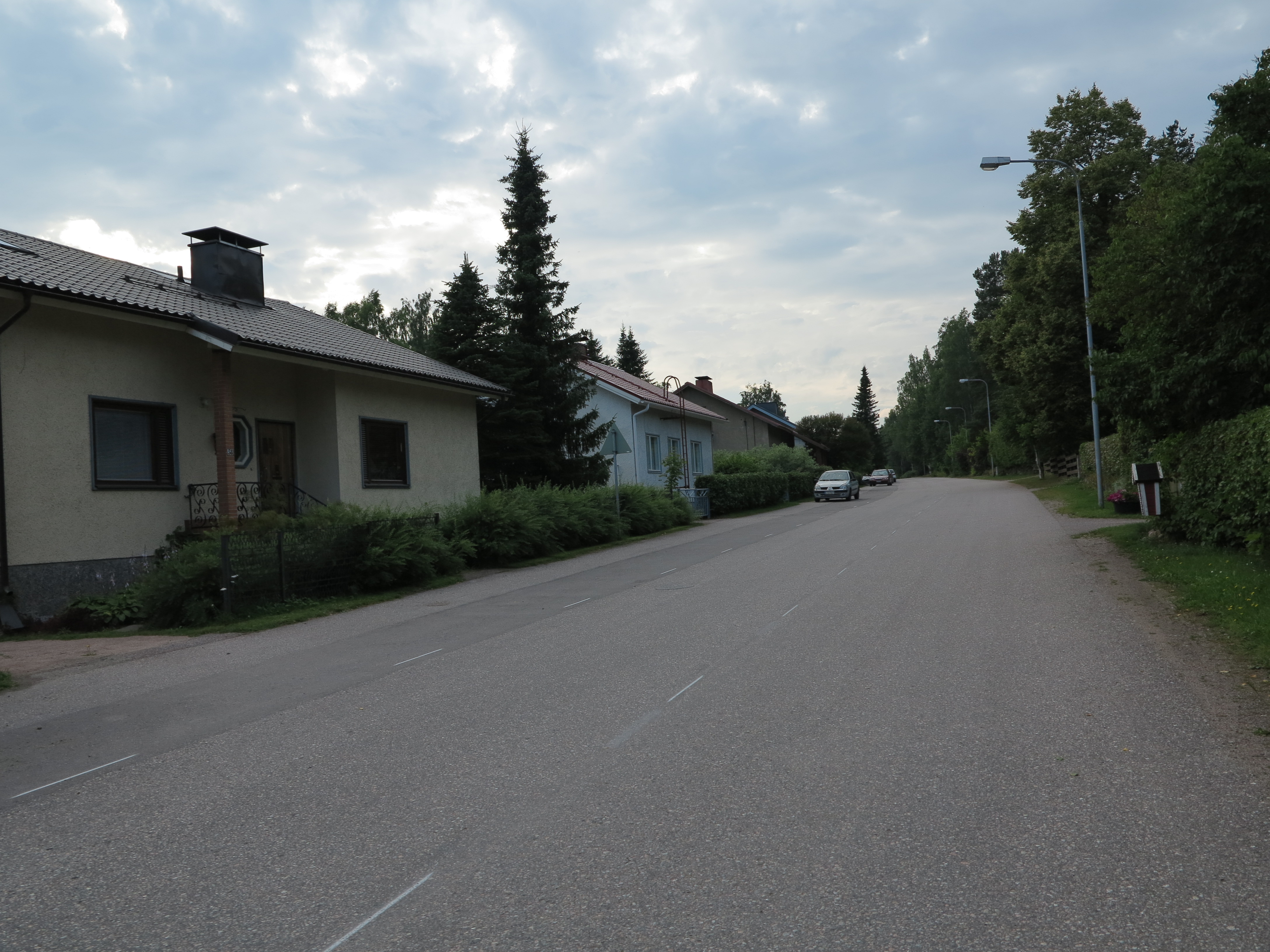 Kymikatu Tommolassa